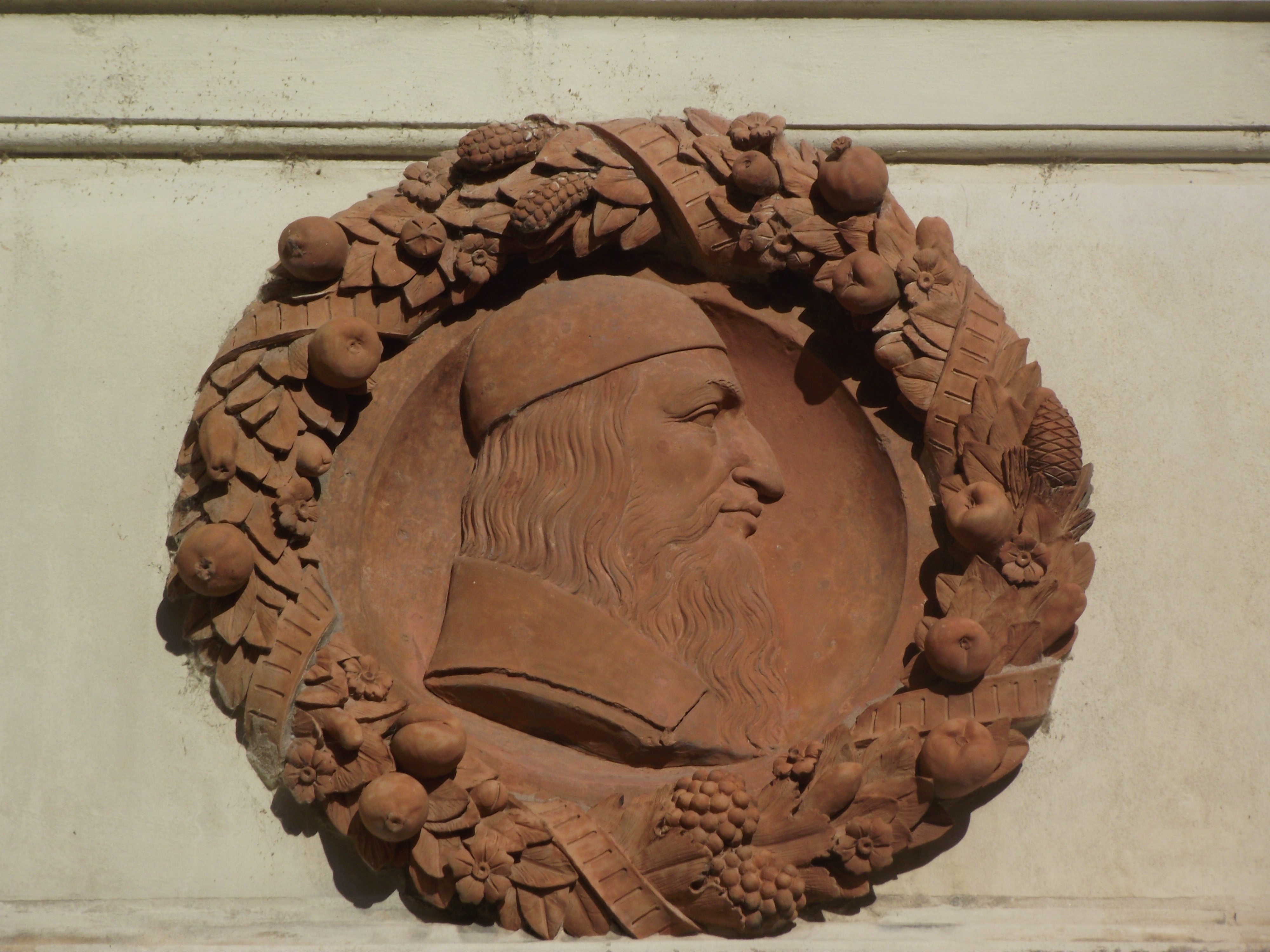 Médaillon en terre cuite datant des années 1880. Cour intérieure de l'hôtel d'Alluye.